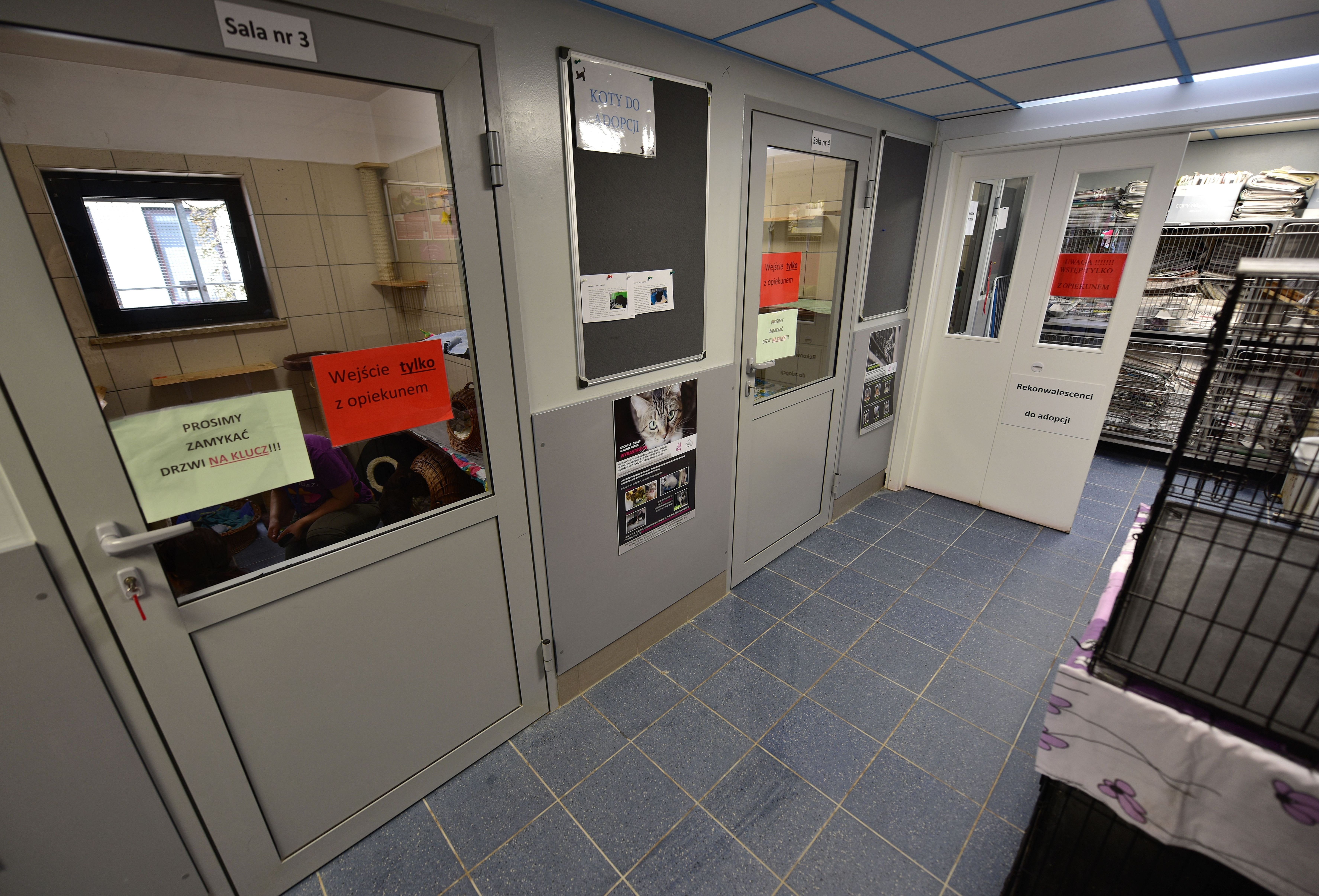 Kociarnia w Schronisku dla Bezdomnych Zwierząt Na Paluchu w Warszawie